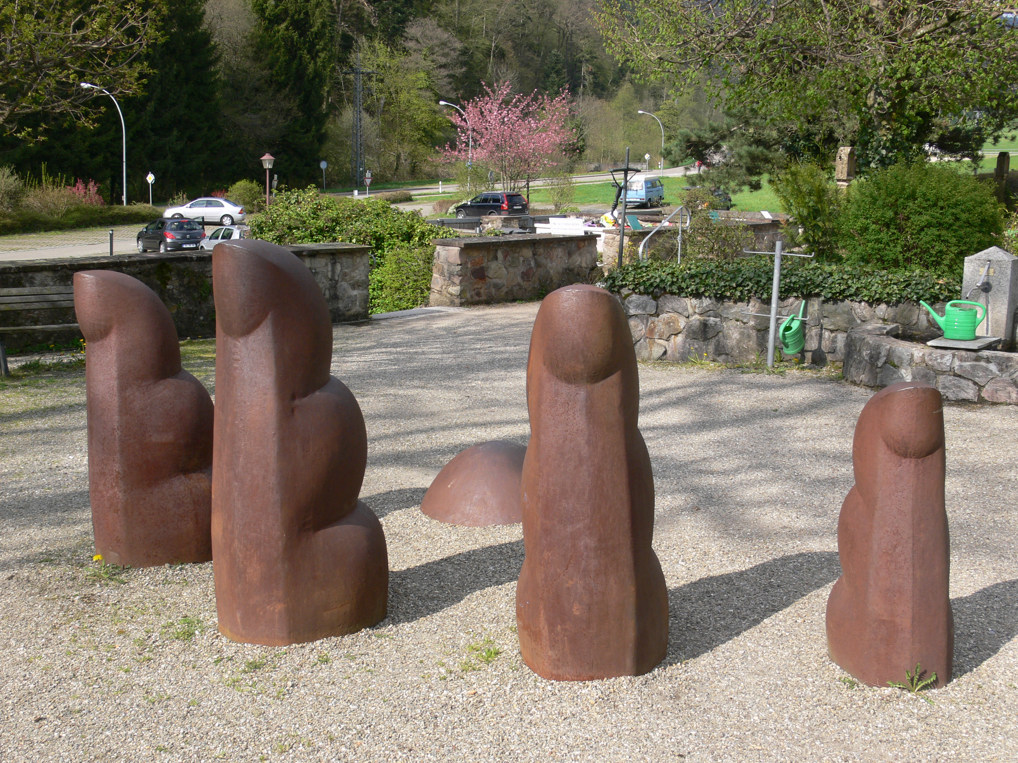 Kloster St. Trudpert im Schwarzwald, Gemeinde Münstertal Farnz Gutmann: Skulptur "Hand", Eisenguss, 1970/72, auf dem Friedhof St. Trudpert Franz Gutmann Date of birth1928Location of birthMünstertal/SchwarzwaldAuthority control VIAF: 50016926 LCCN: n82005464 GND: 118543814 ULAN: 500073469 ISNI: 0000 0000 7858 0384 WorldCat